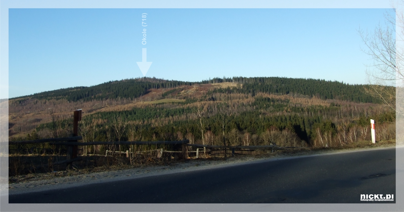 Widok na Okole z drogi 365 (Jelenia Góra - Legnica). Odległość w linii prostej: 2 km